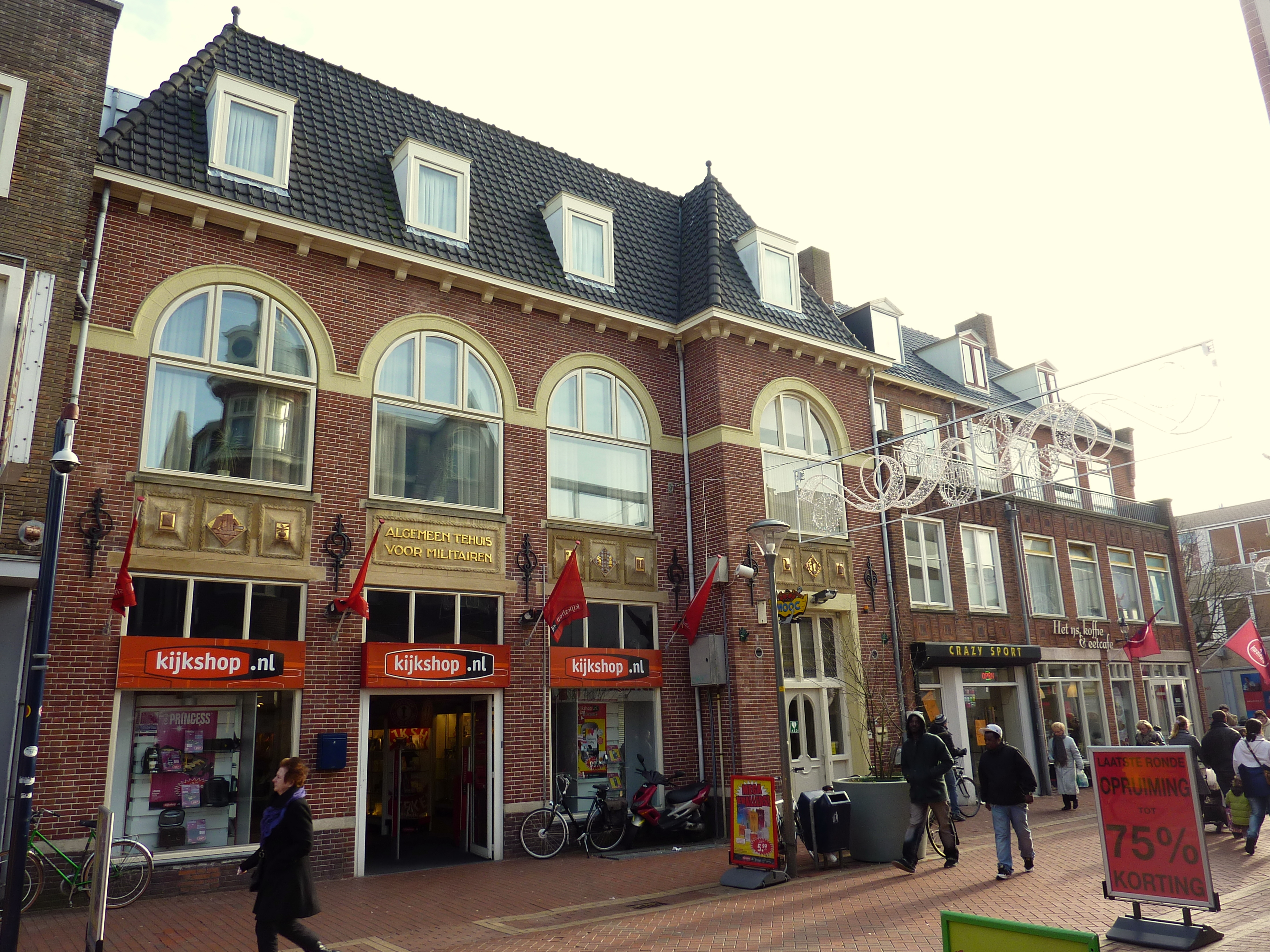 Den Helder